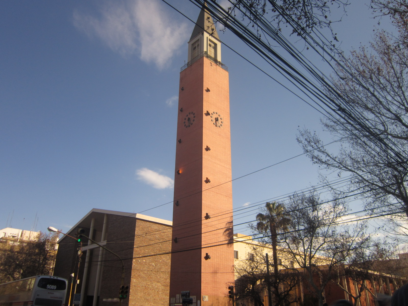 Fotografía a la Catedral de San Juan, Argentina.